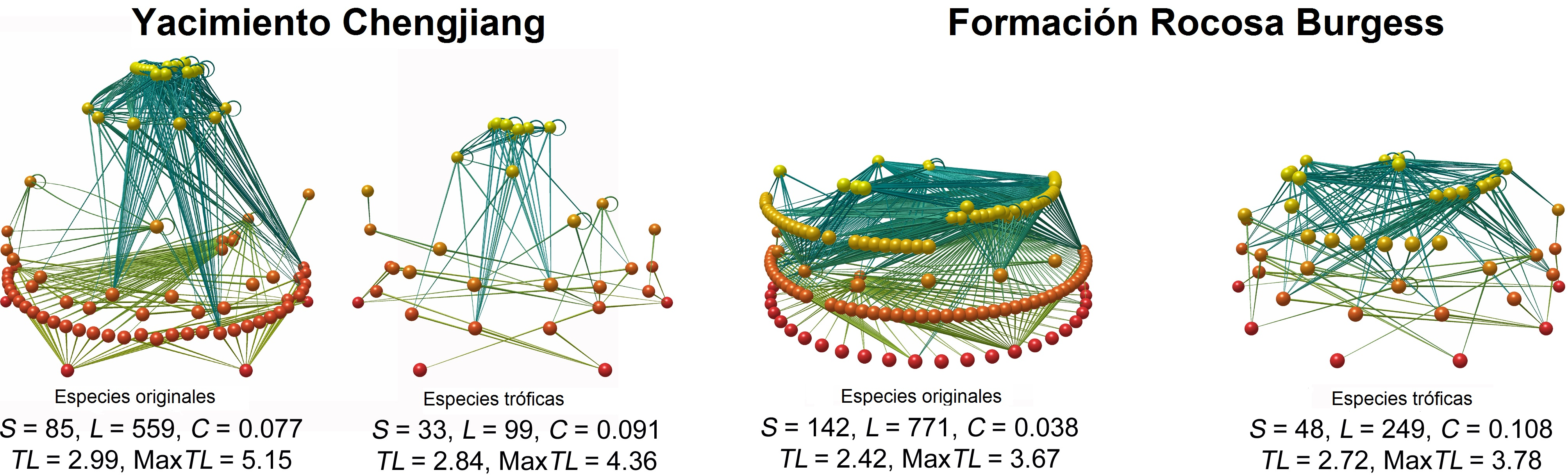 Redes alimenticias y niveles tróficos de los ambientes rocosos de Chengjiang y Burgess